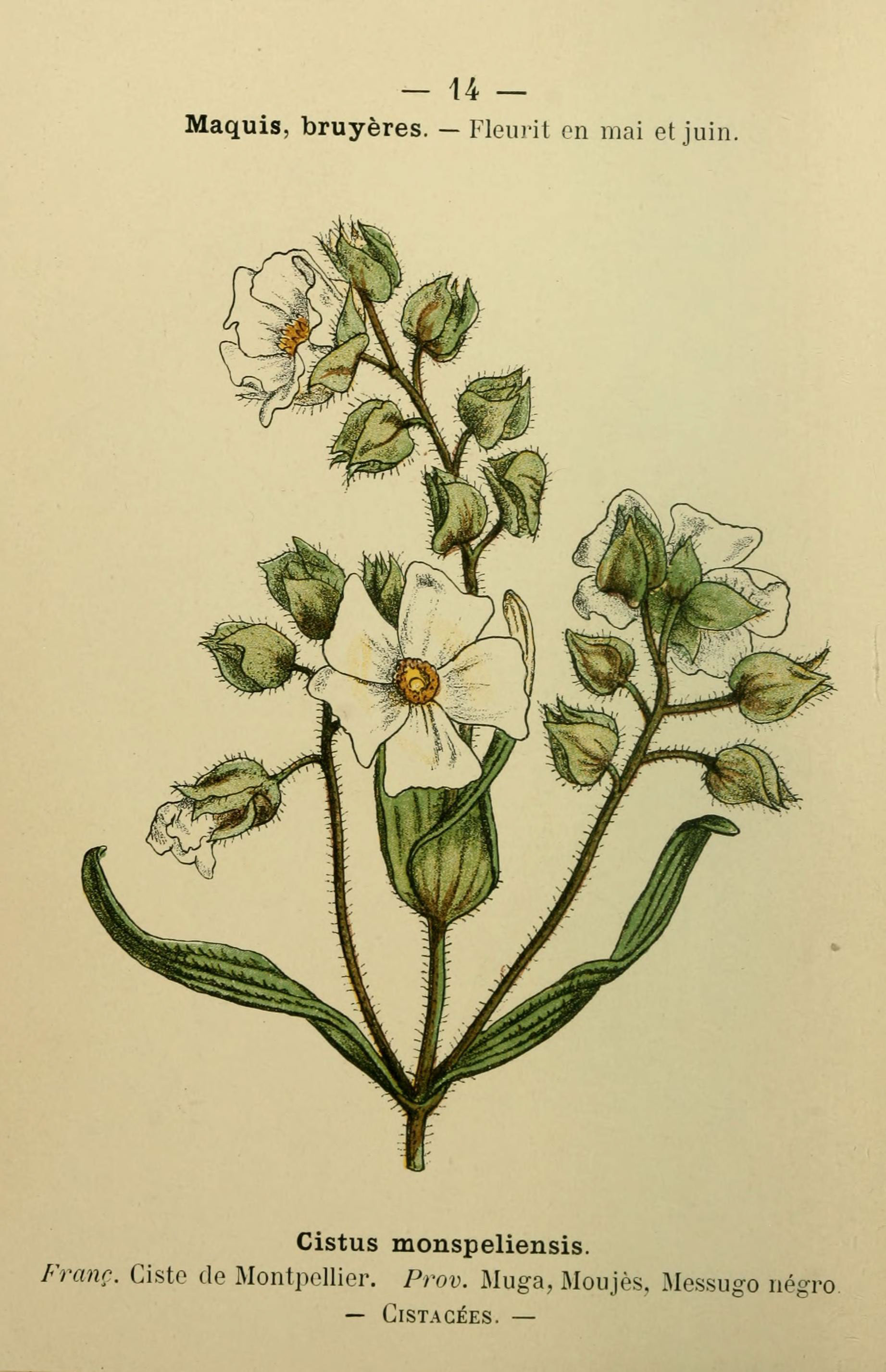 — 14 — Maquis, bruyères. - Fleu)-it en mai et juin. Cistus monspeliensis. Franc. Ciste de Montpellier. Prov. IMuga, Moujès, Messugo négro — GiSTAGÉES. —